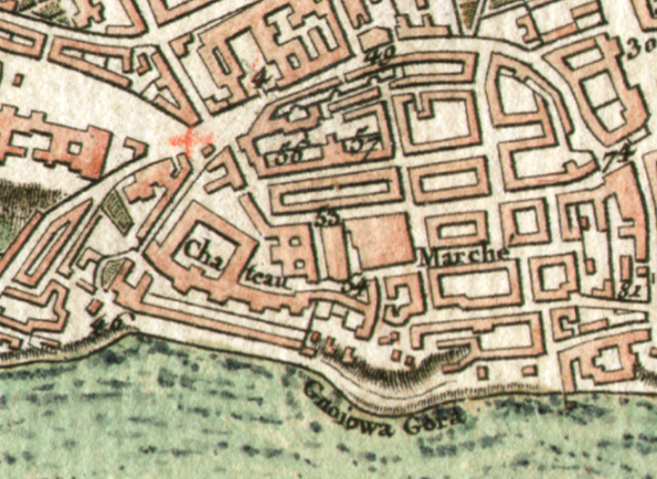 Fragment mapy Warszawy Rizzi Zannoniego z 1772 roku obejmujący stare miasto, w tym Gnojową Górę